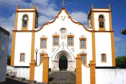 Igreja Matriz de Santa Cruz, Praia da Vitória, Ilha Terceira, Açores.